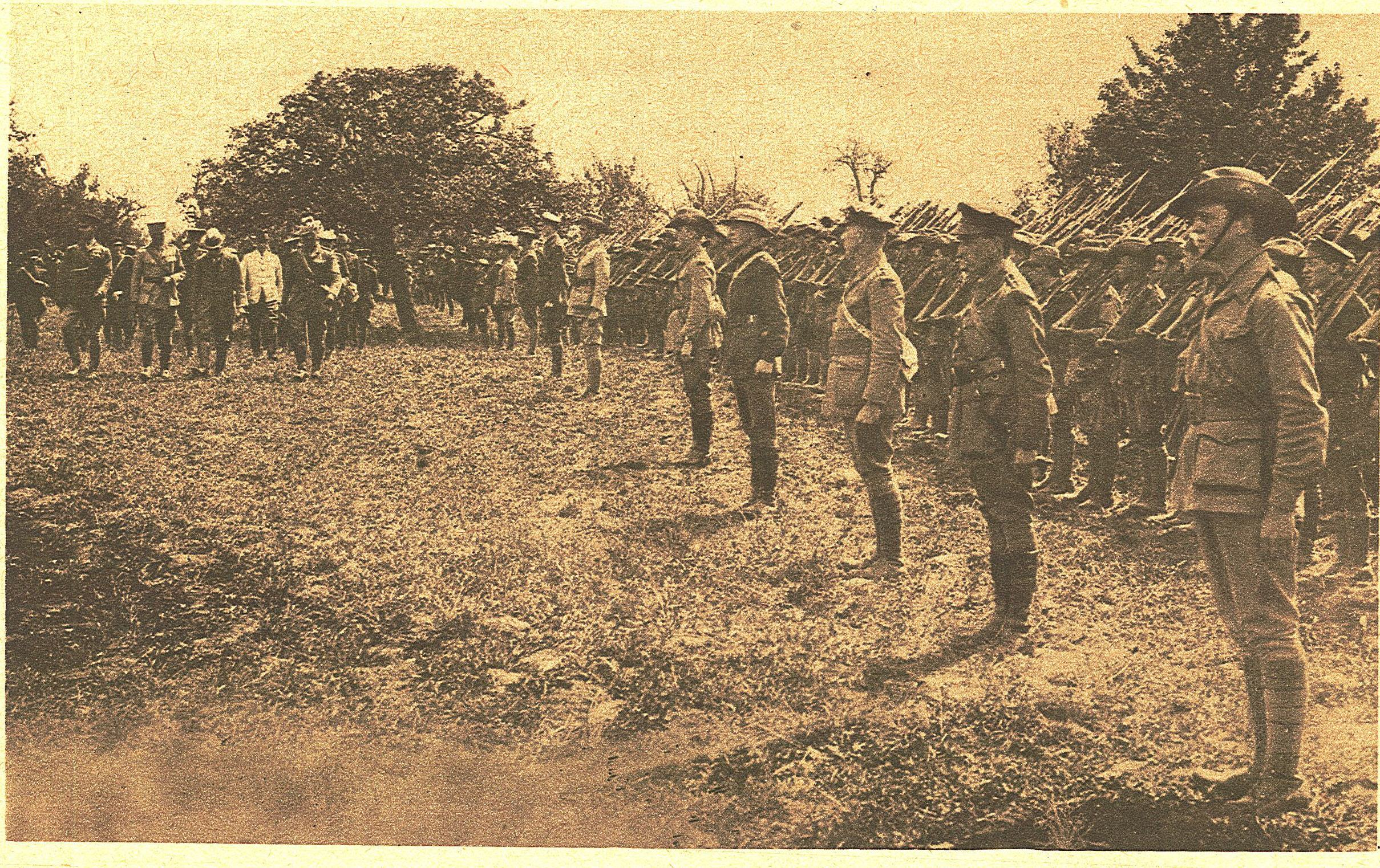 Le Miroir, dimanche 27 août 1916. N°144. La cavalerie du Deccan et les ANzacs